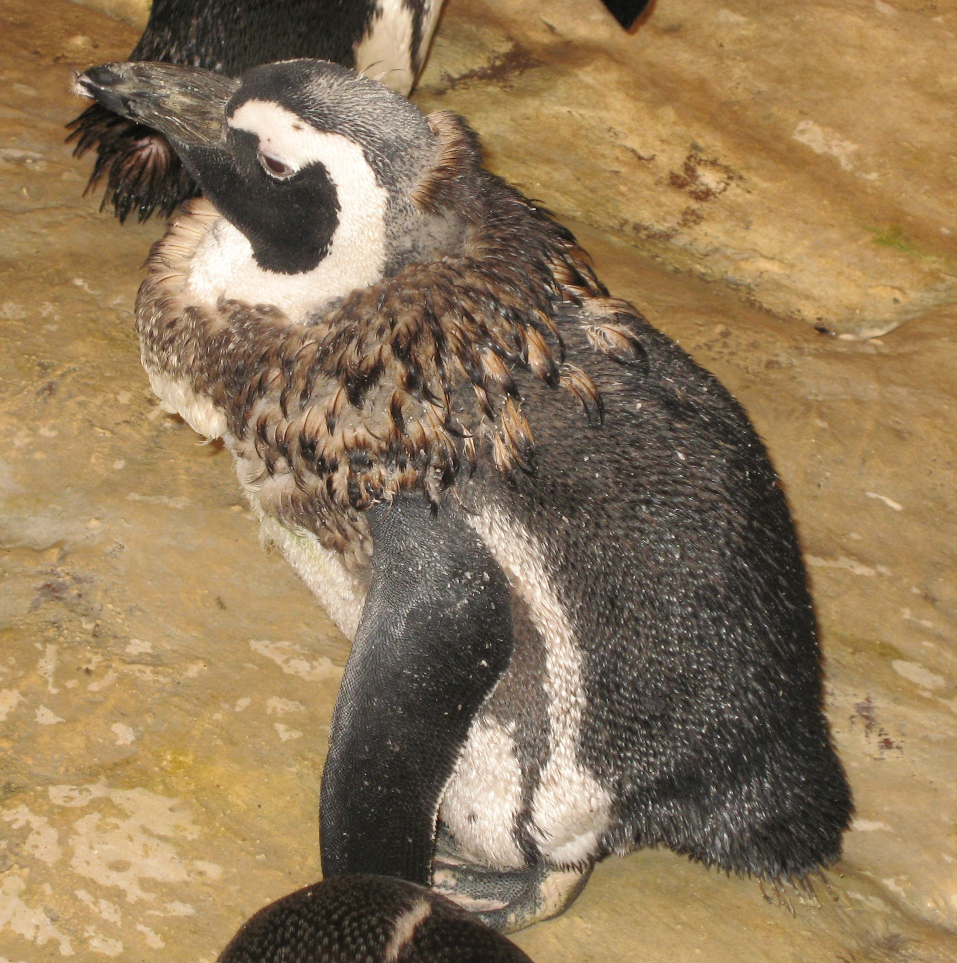 Spheniscus demersus moulting (en mue) in Nausicaä Centre National de la Mer